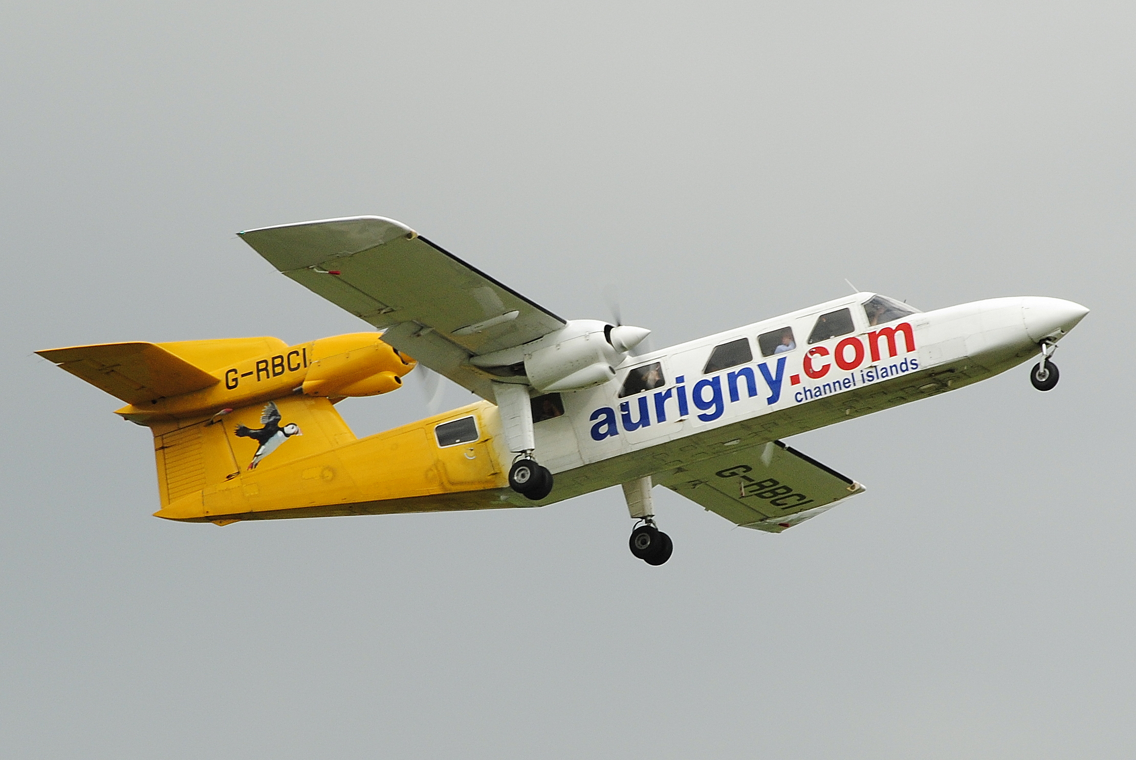 G-RBCI